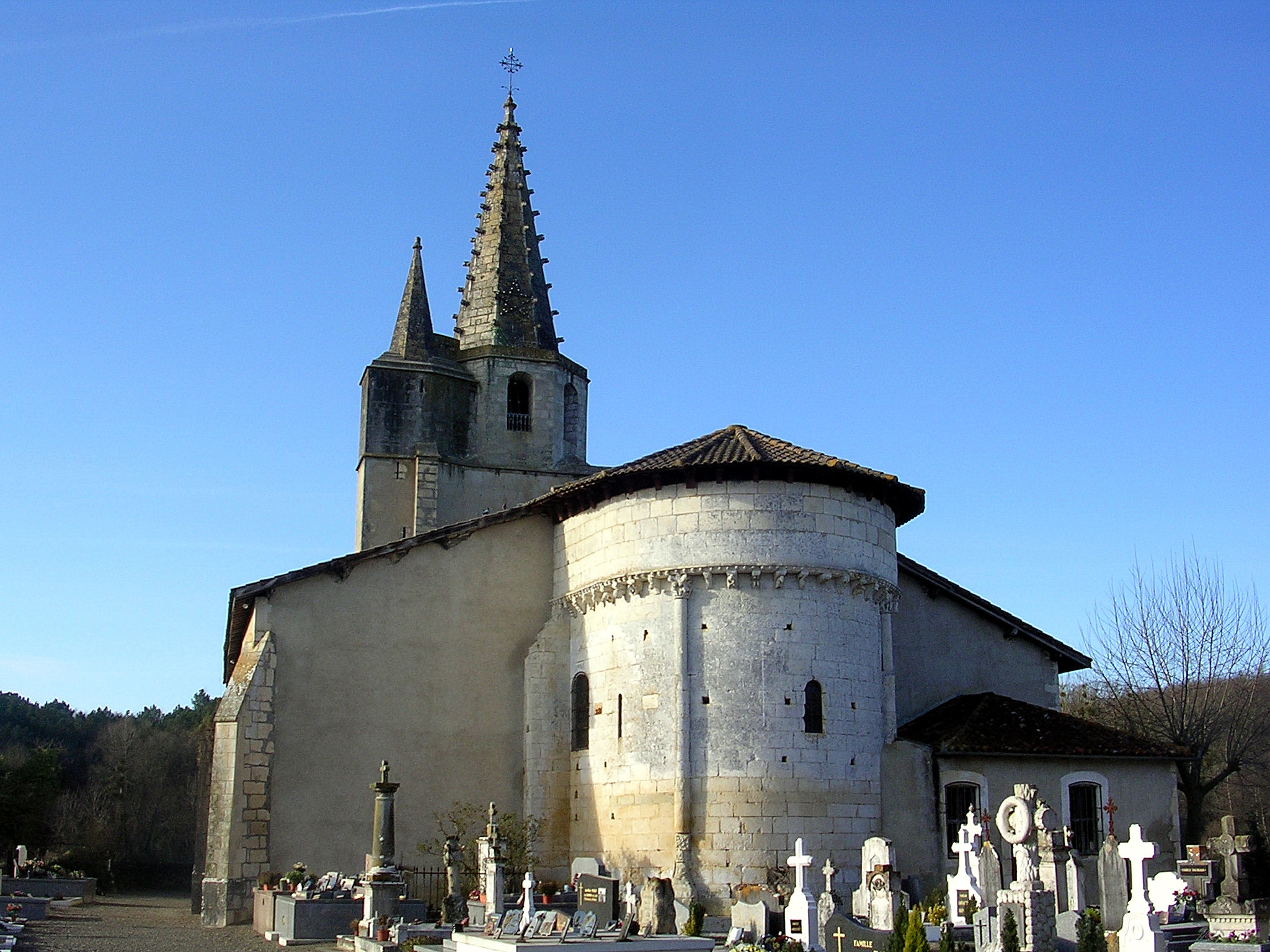 Eglise d'Audignon, dans le département français des Landes